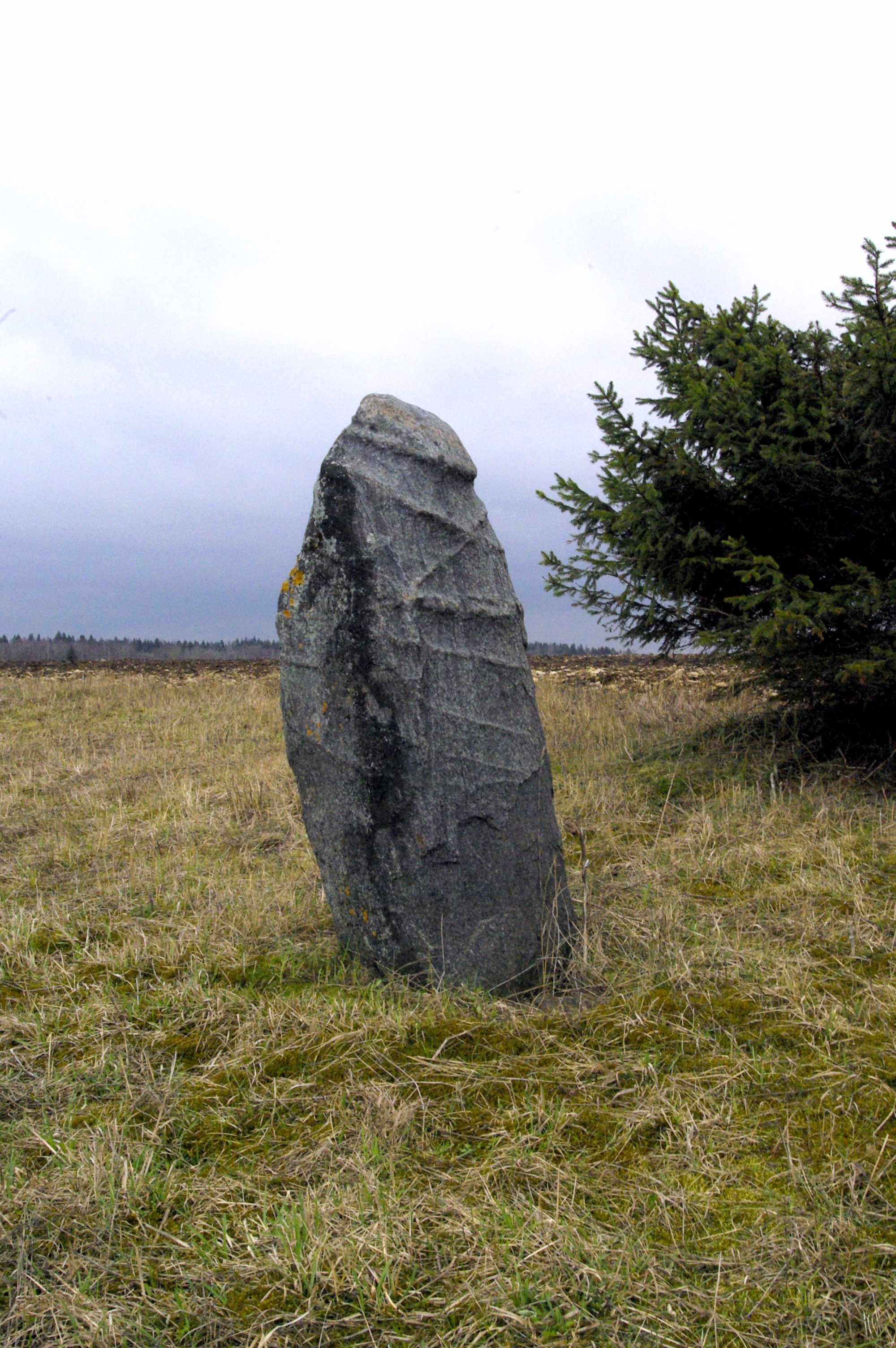 Toolse rannamehe tütar